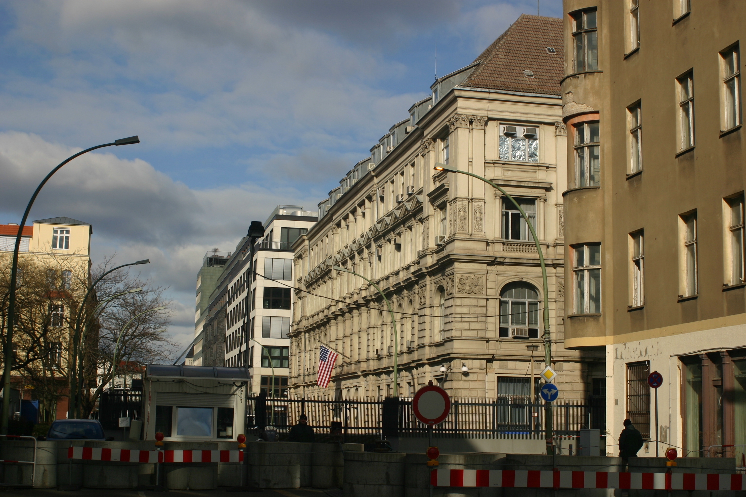 US-Amerikanische Botschaft in Berlin / US-American Embassy in Berlin (February 2008)